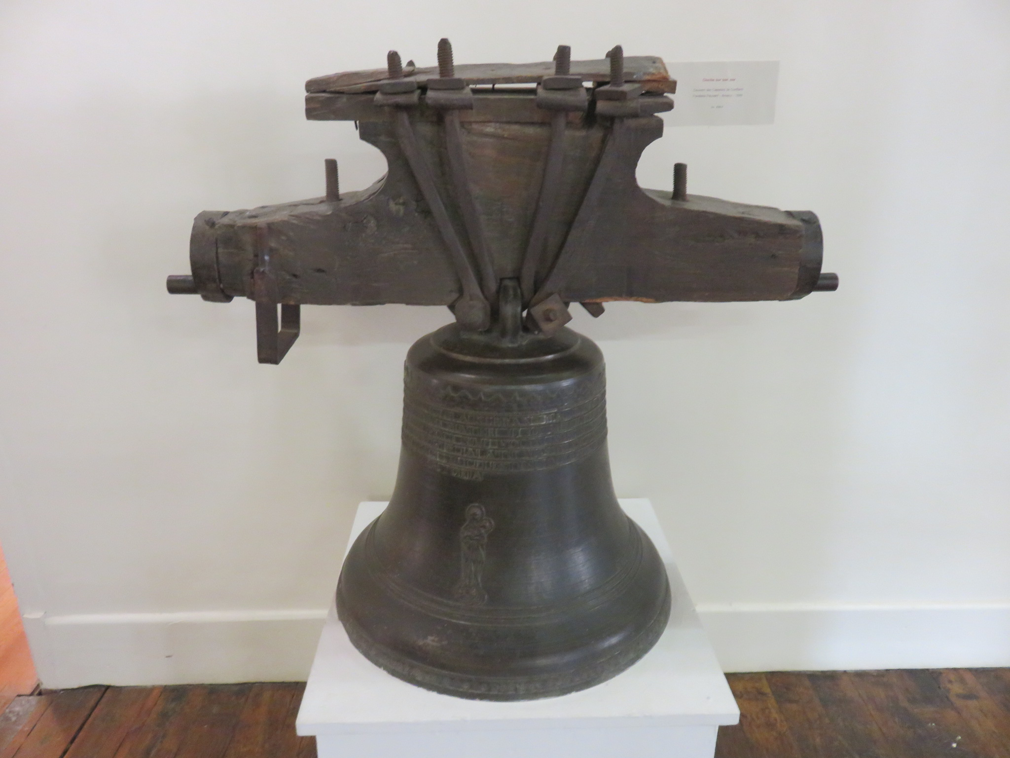 Musée d'art et d'histoire de Conflans : cloche sur son axe de 1844, du couvent des Capucins de Conflans, de la fonderie Paccard d'Annecy